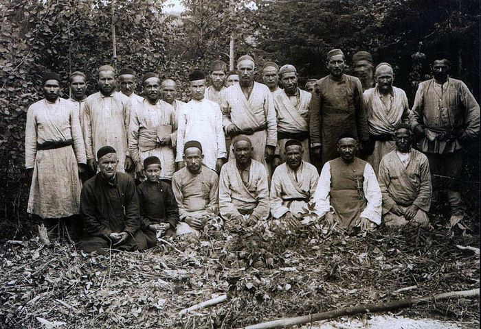 Башҡортса: Гайнинские башкиры на строительстве моста через Тулву